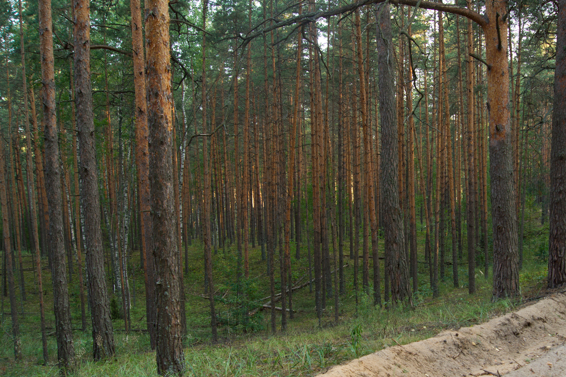 Сосновый бор недалеко от озера Лещёвое в окрестности деревни Полесково (граница Муромского и Гороховецкого районов Владимирской области)